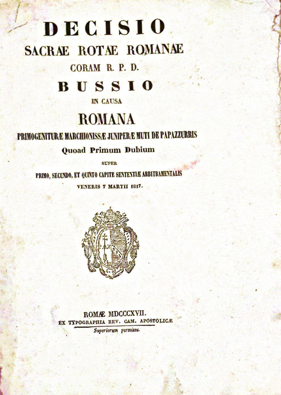 Decisio Sacrae Rotae Romanae